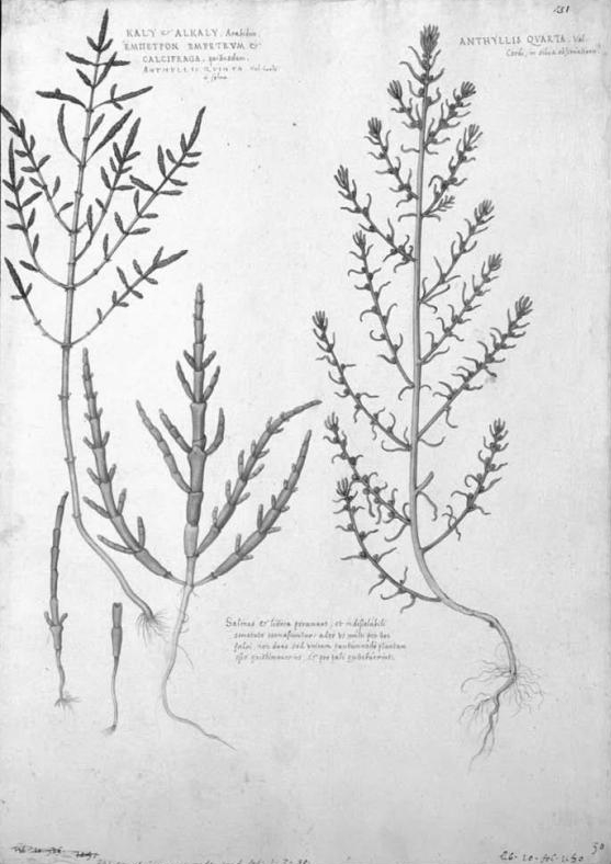 Salicornia: Libri picturati A 24 f. 31